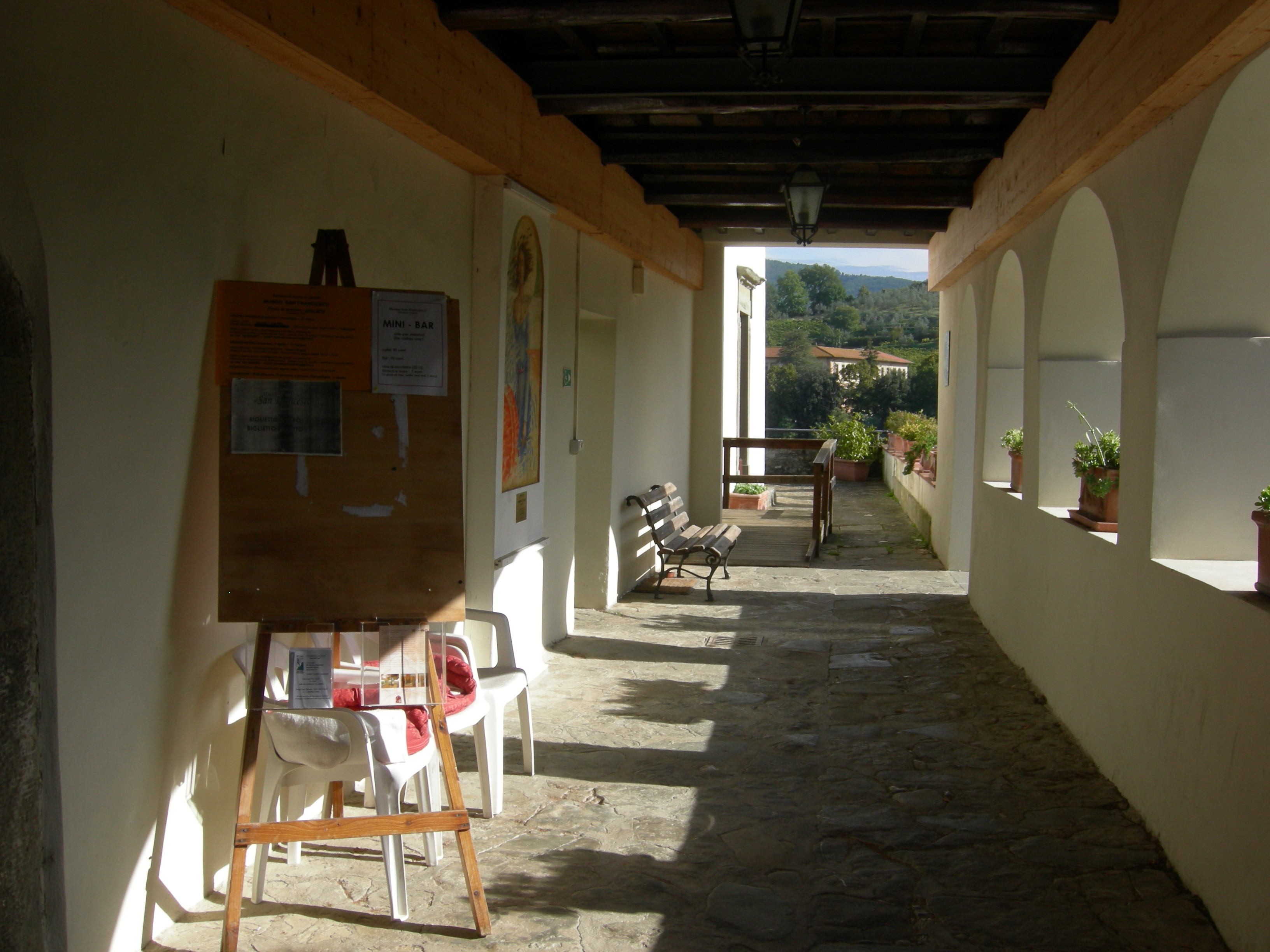 Museo d'arte sacra di San Francesco, ex convento di San Francesco Greve in Chianti (Firenze)